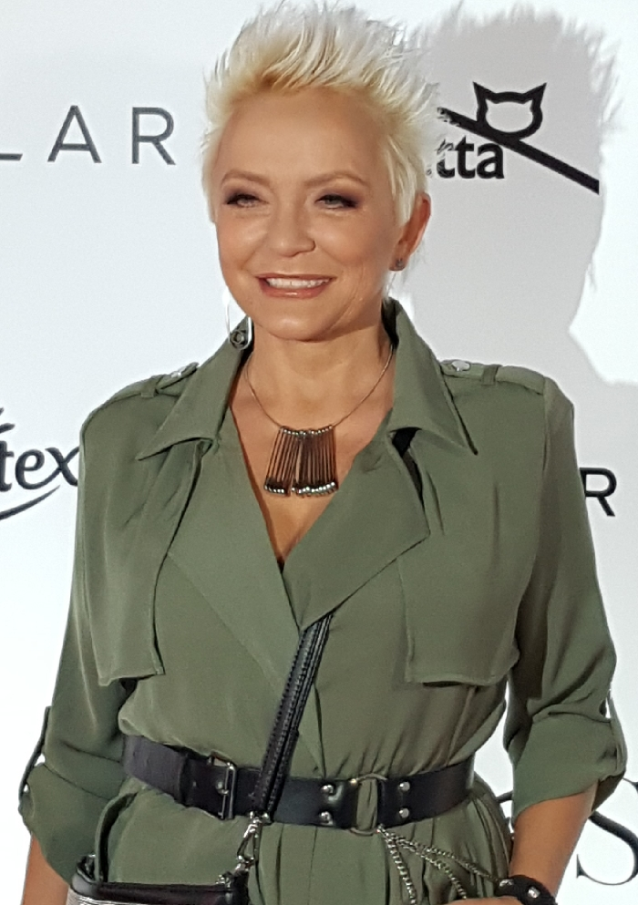 Polska piosenkarka Małgorzata Ostrowska w 2019 roku.